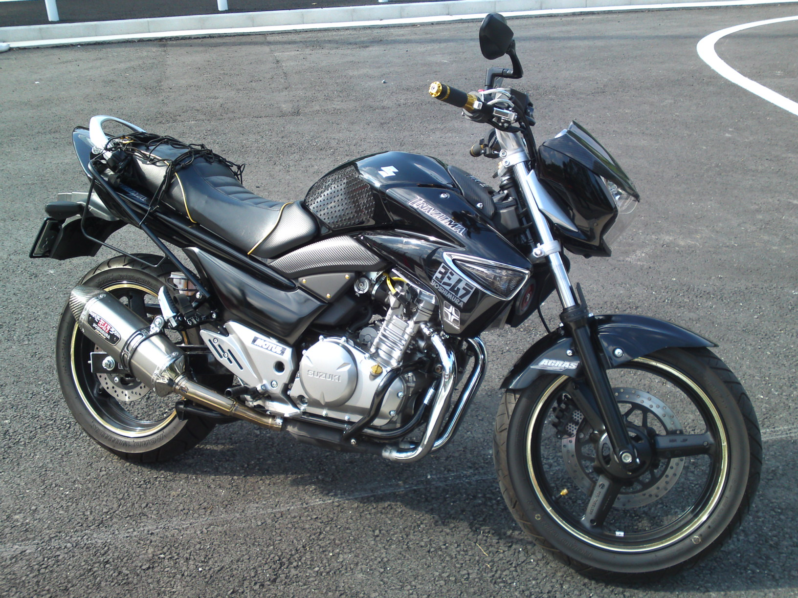 スズキGSR250